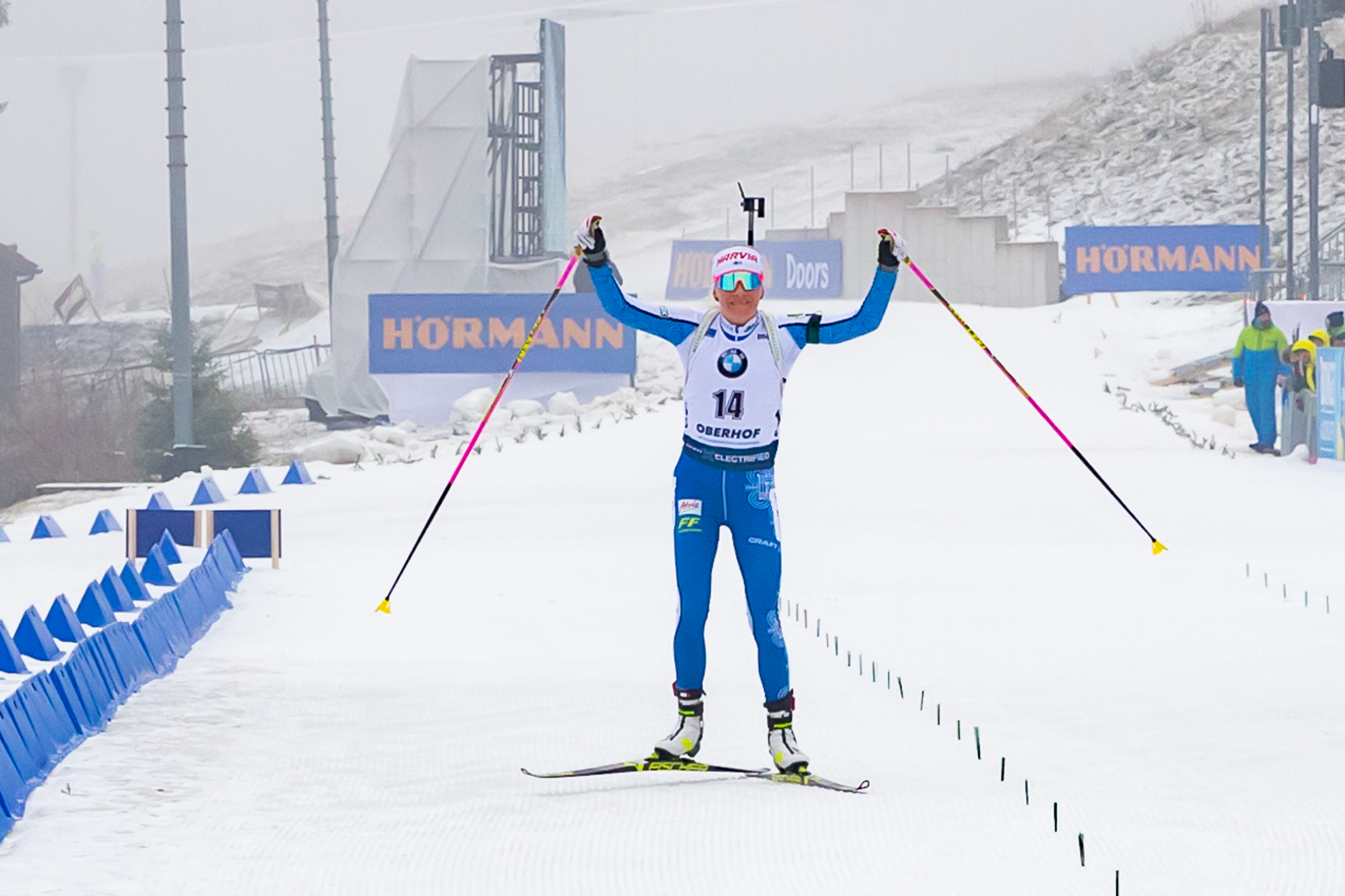 IBU World Cup Biathlon Oberhof; Kaisa Makarainen (FIN, Finnland) gewinnt den Massenstart der Frauen; Sieger, Erstplatzierter, Goldmedaille, gold medal; Jubel, celebration